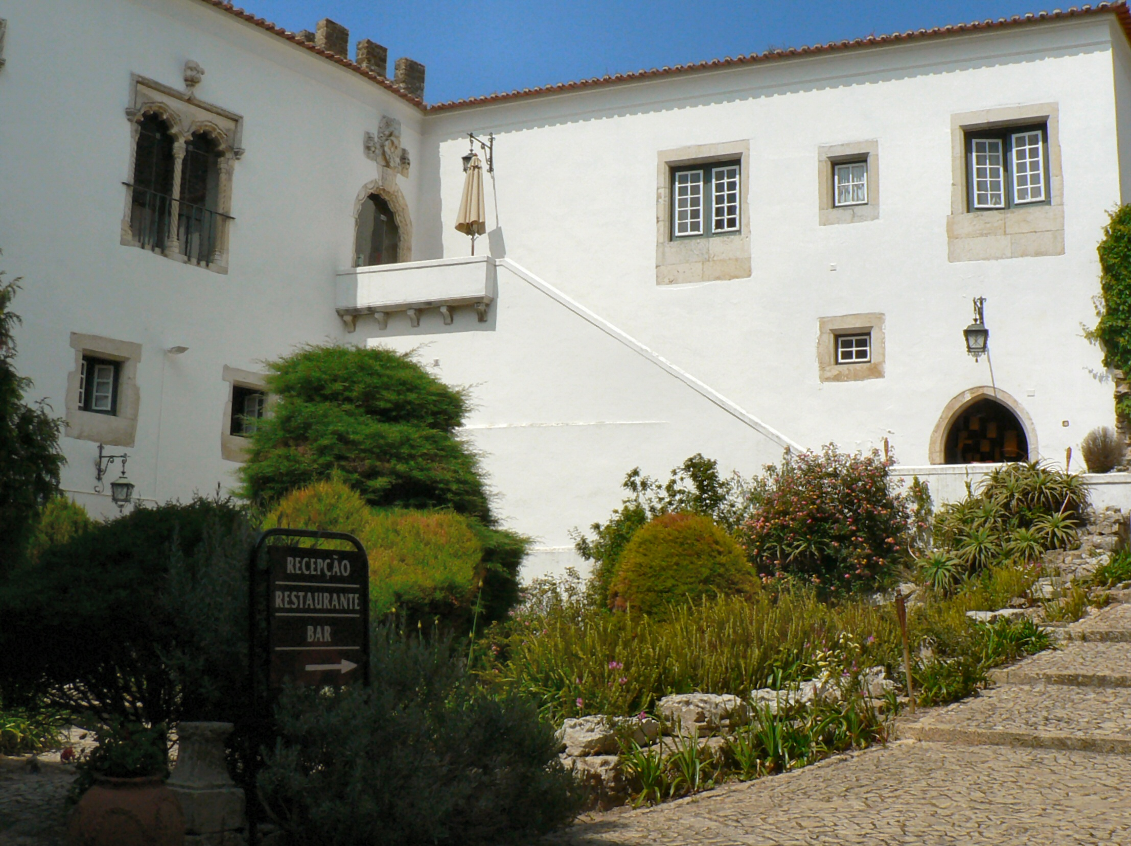 Pousada do Castelo em Óbidos